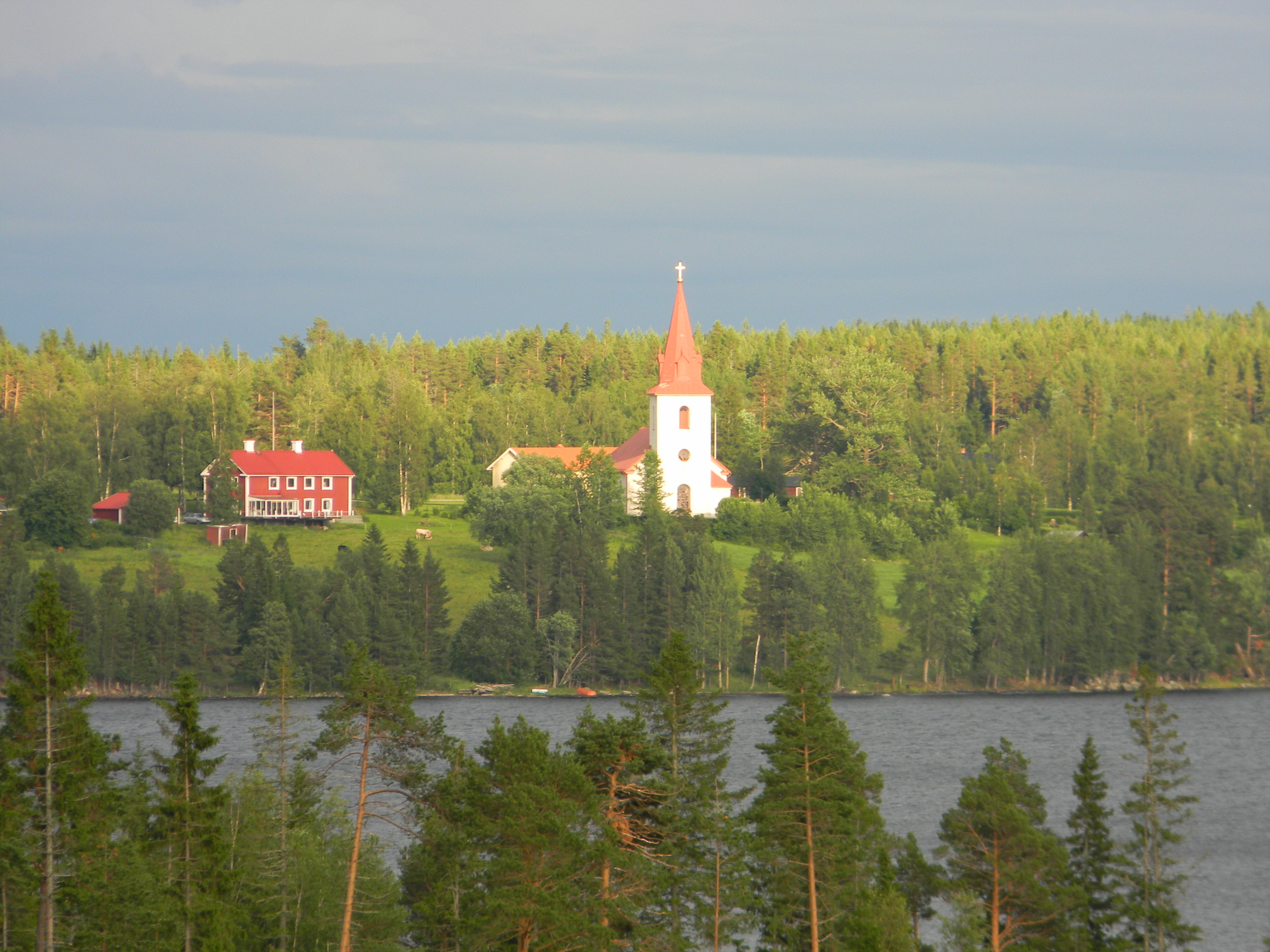 Myssjö kyrka, Bergs Kommun Sweden